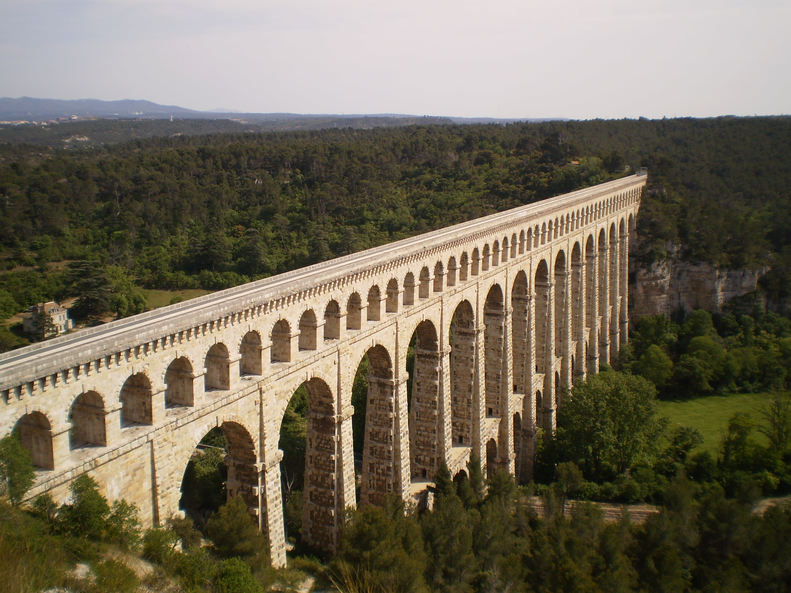 Aqueduc de Roquefavour